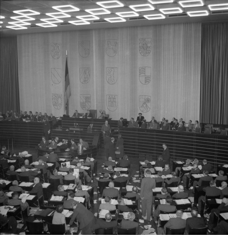 1. Wahlperiode 1949-1953: Wiedereinführung des Schumanplans am 7.1./9.1.1952 (?). Blick in den Bundestagssaal und auf die Ministerempore.